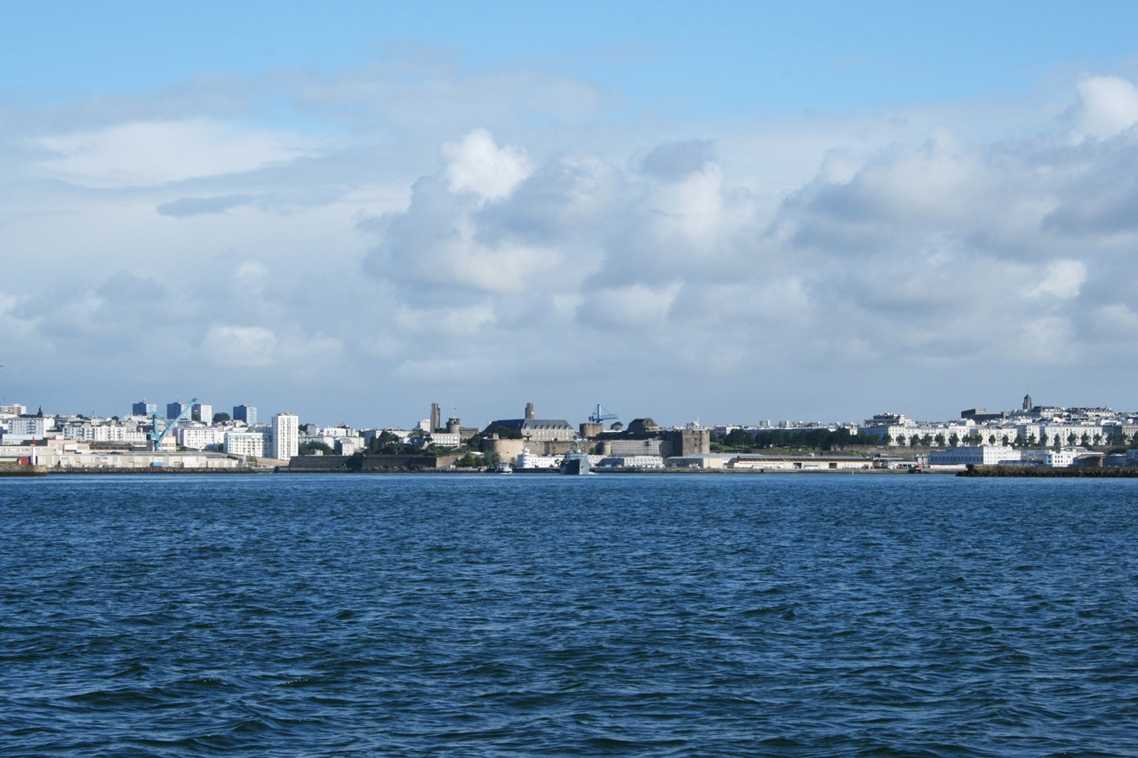 Entrée du port militaire de Brest